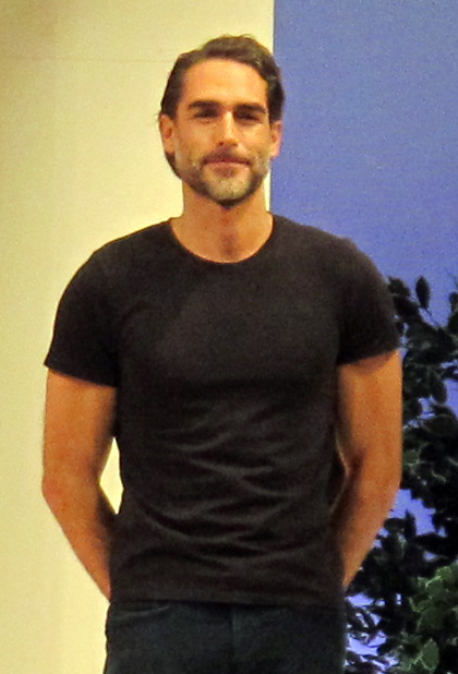 Teatro Giuseppe Verdi (Firenze)